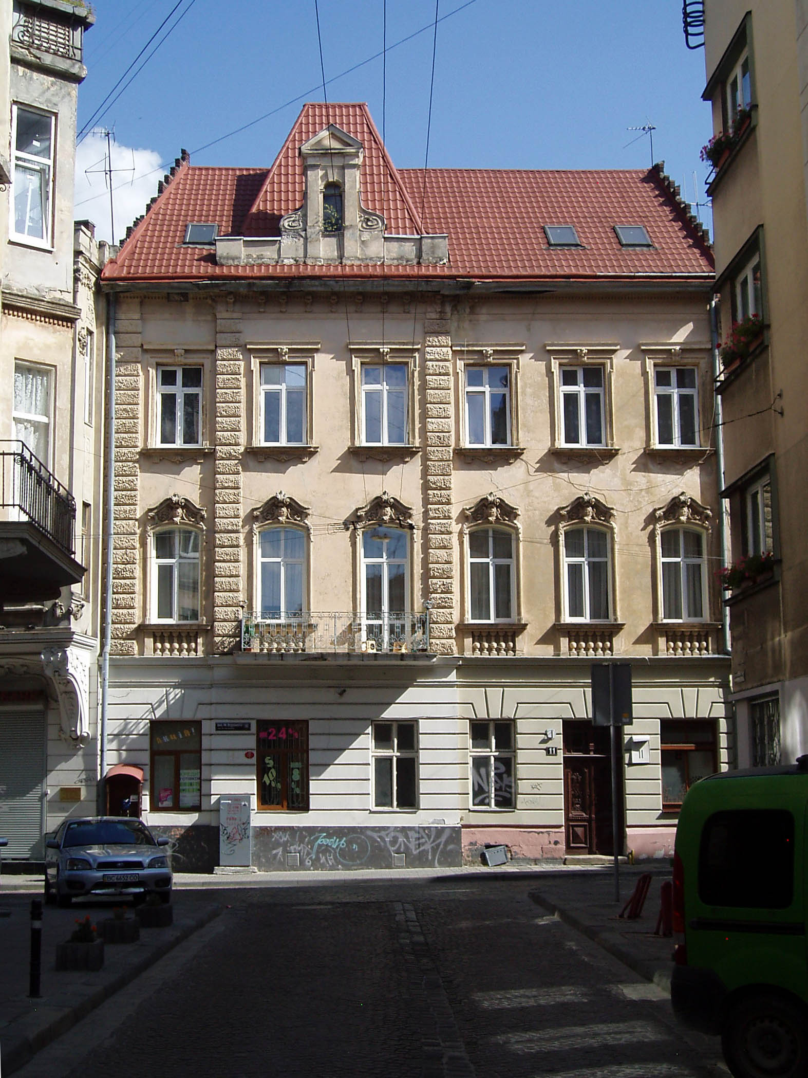 Будинок № 11 на вулиці Вороного у Львові